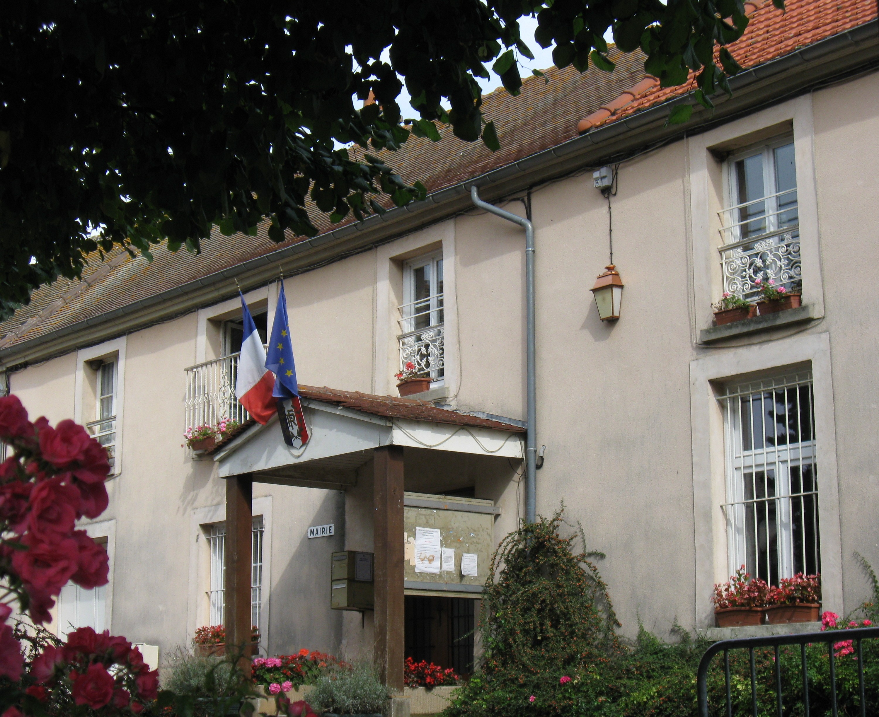 Mairie de Villeroy (Seine-et-Marne, région Île-de-France).